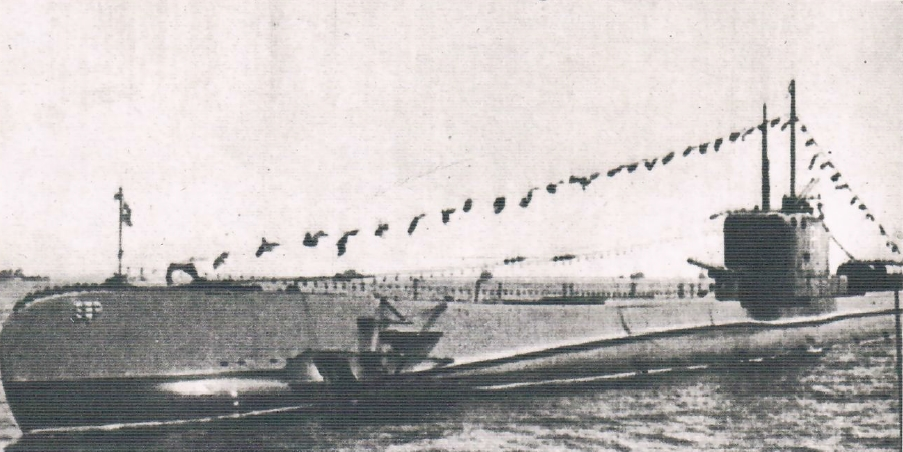 ORP "Sęp" we wrześniu bronił Helu w rejonie Rozewia. Internowany w Szwecji, do kraju powrócił w 1945 r. i pełnił służbę aż do 1971 r. [opis oryginalny]